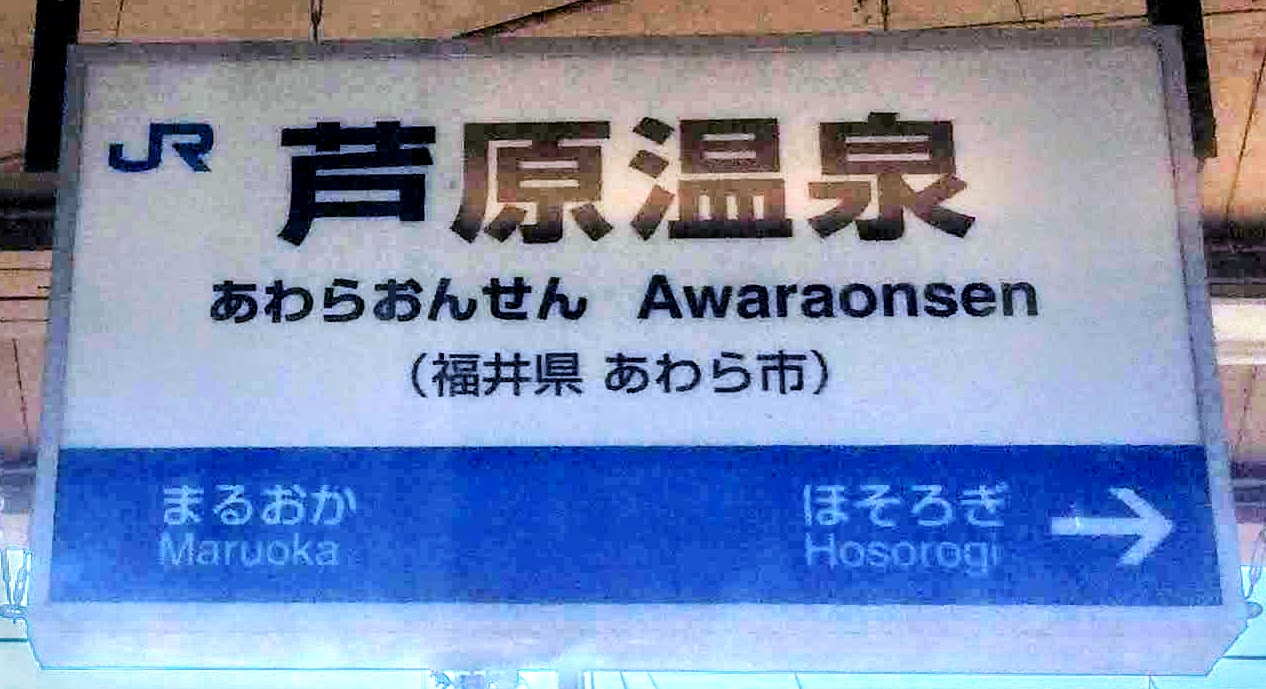 芦原温泉駅の駅名標